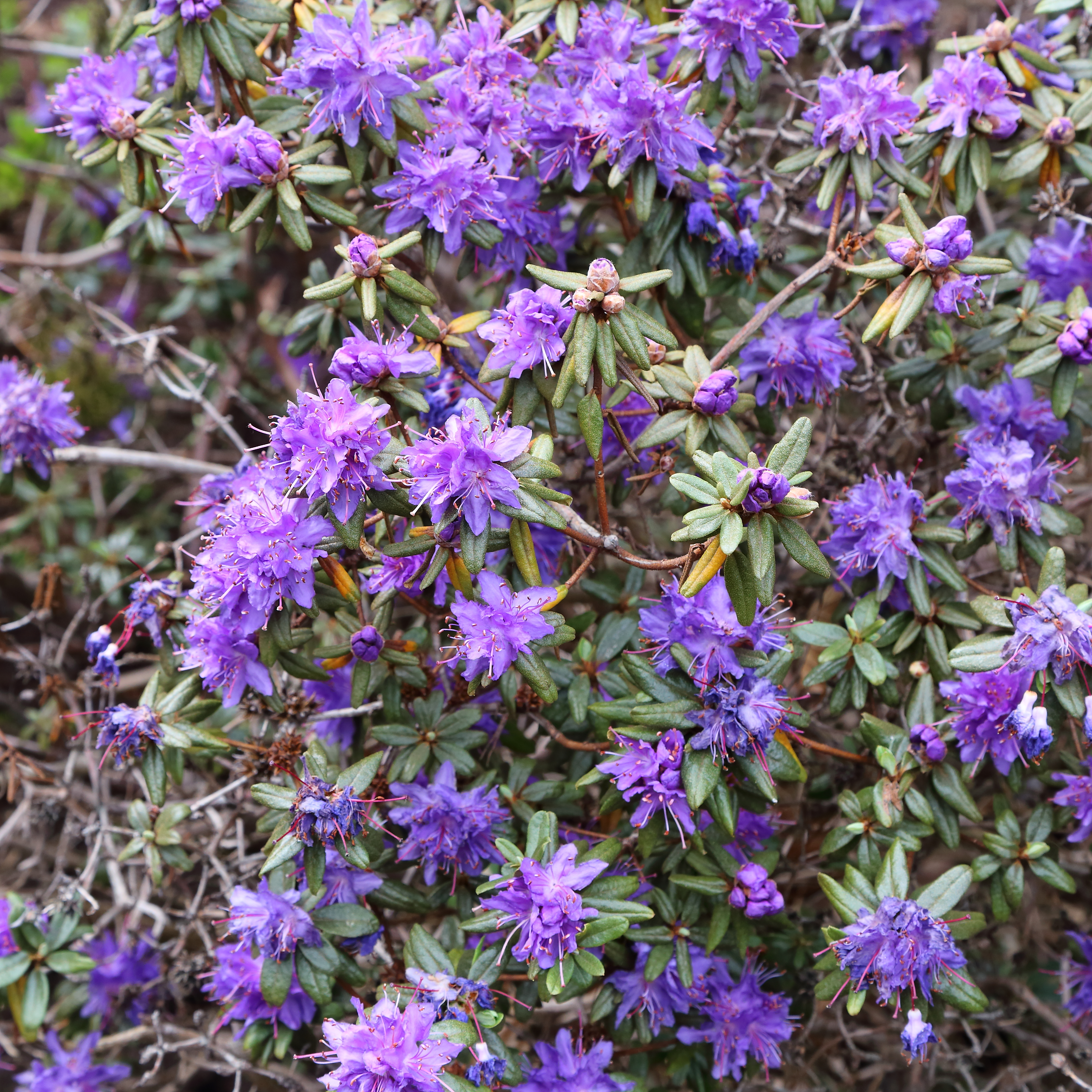 Rhododendron russatum identifierad med hjälp av skylt i Göteborgs botaniska trädgård.